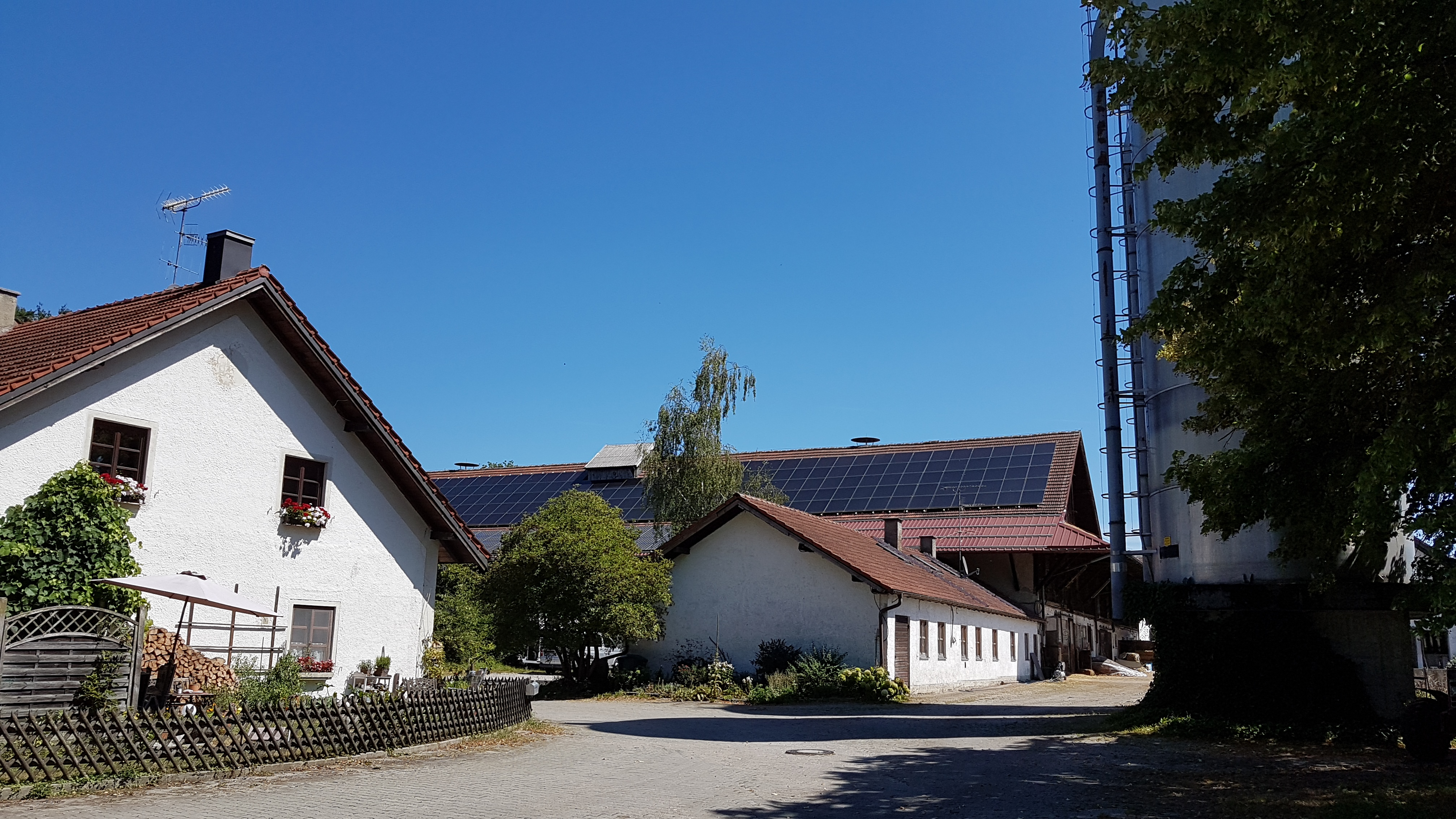 Gut Arzla (Inning am Ammersee)